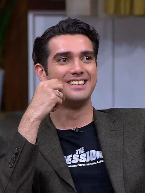 Fachri Albar saat menjadi bintang tamu di Ini Talk Show pada tanggal 28 Desember 2016.